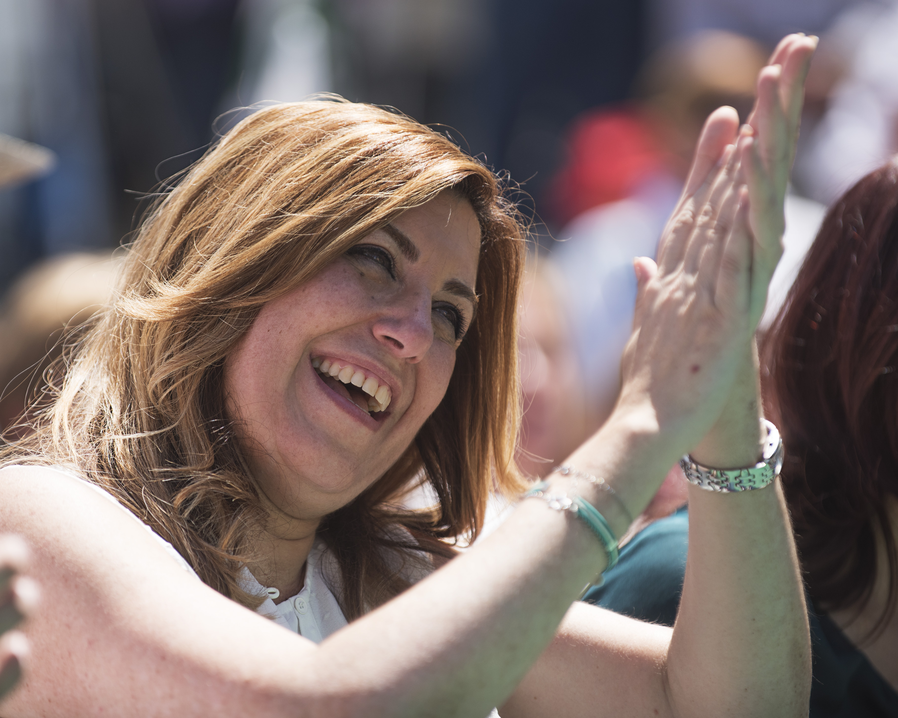 Fiesta de la Rosa en Martos (9-5-2015)